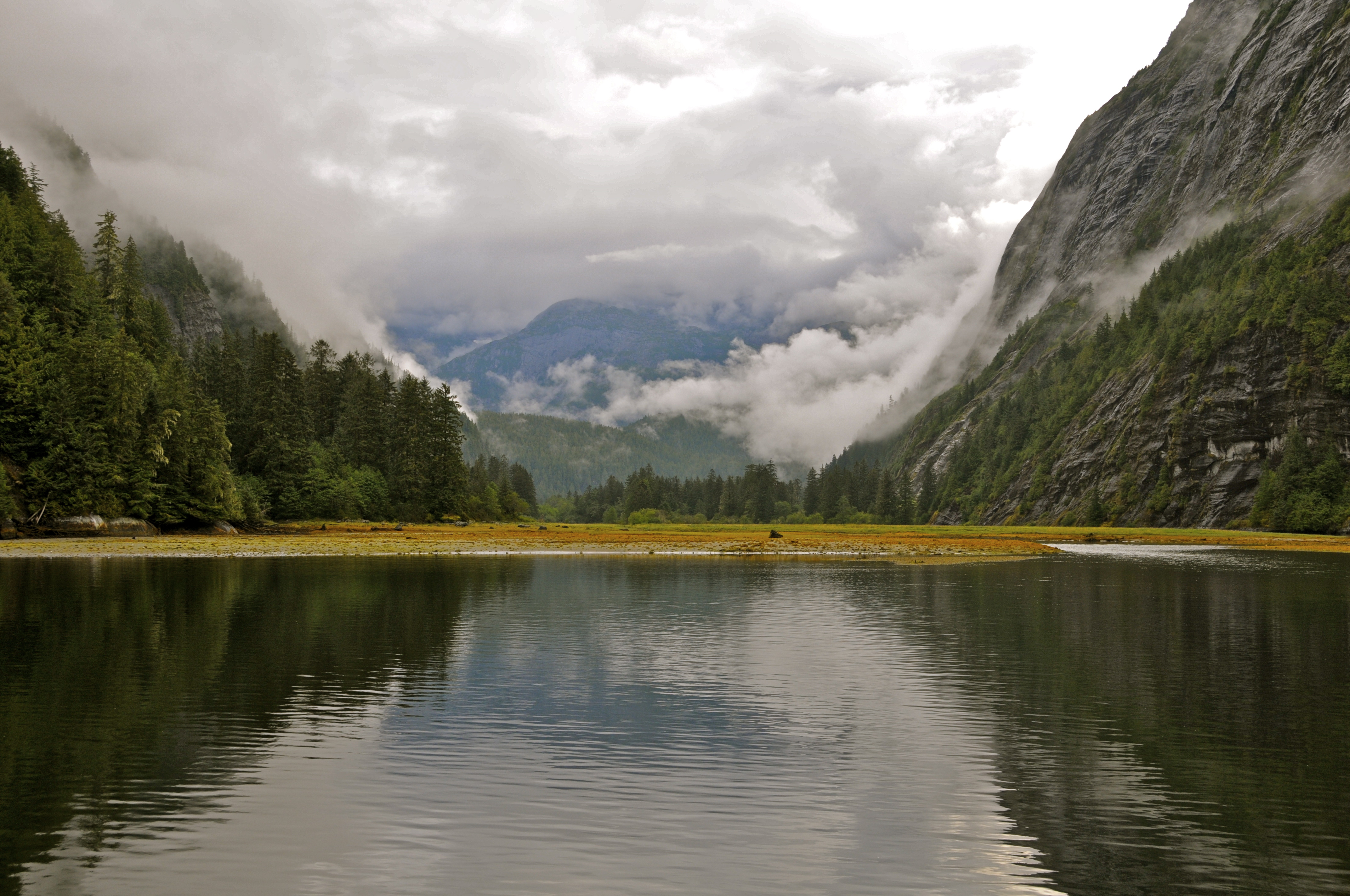 Day 6